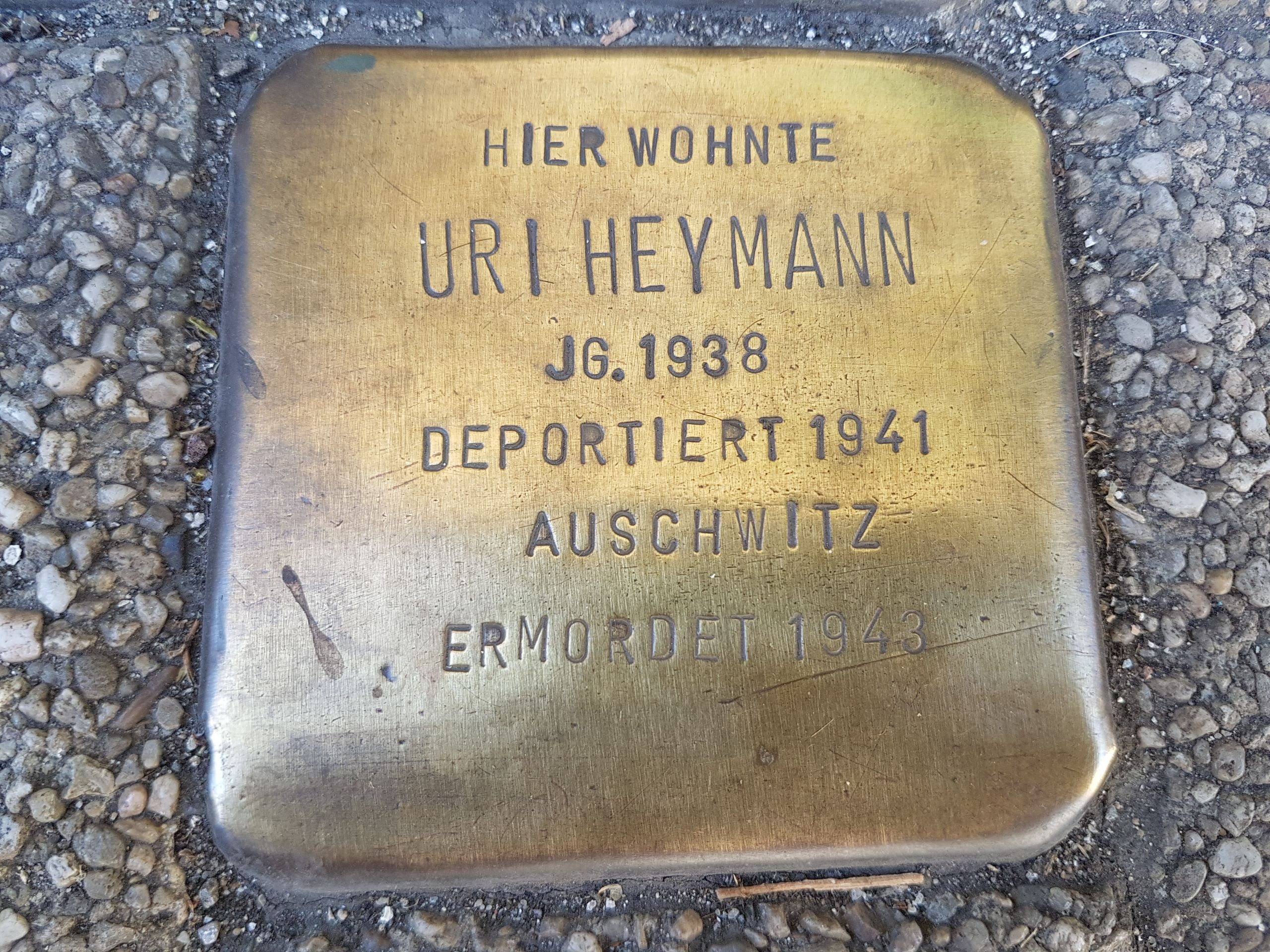 Stolperstein Duisburg Uri Heymann